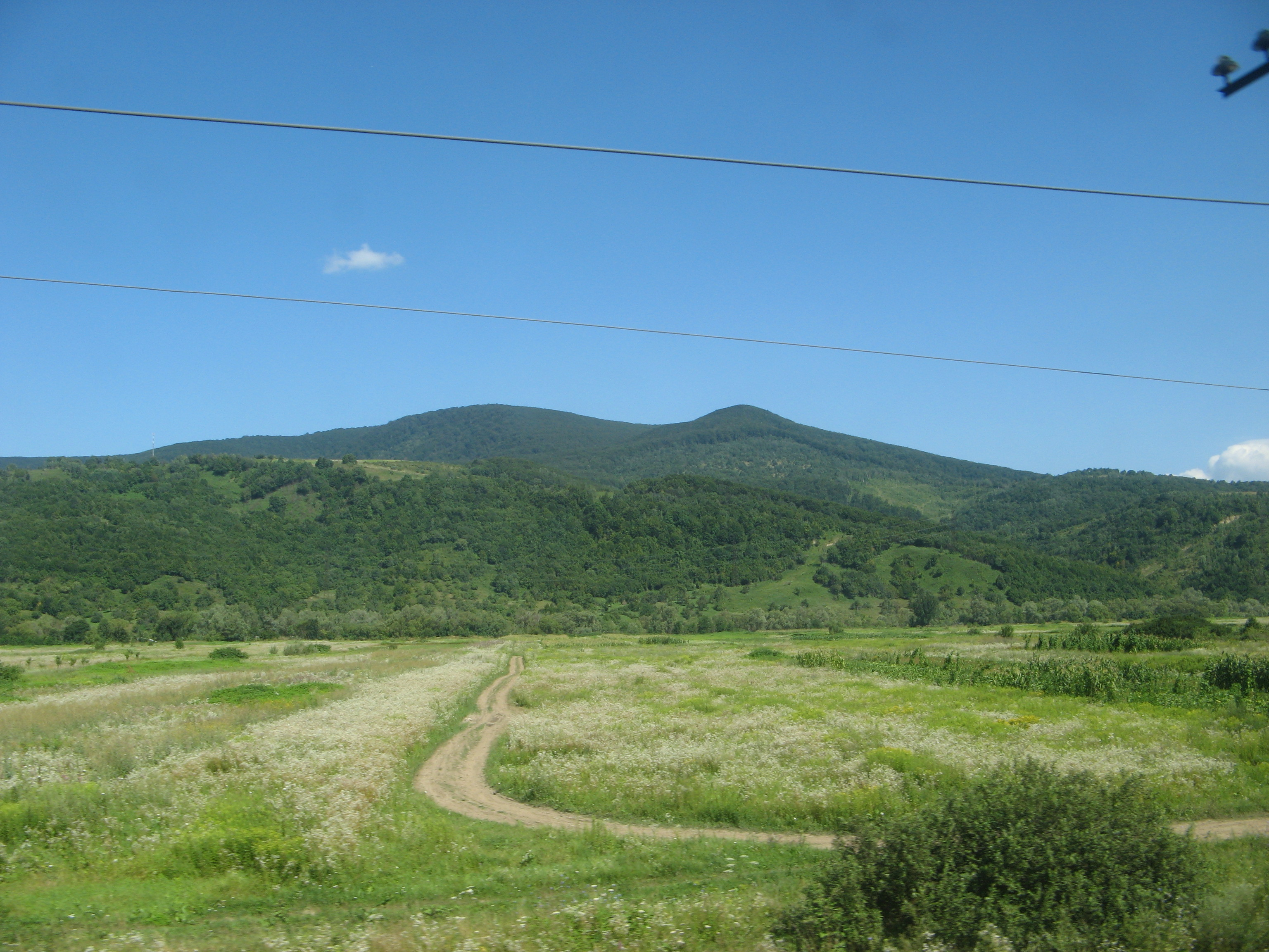 Масив Синяк (Закарпатська область)